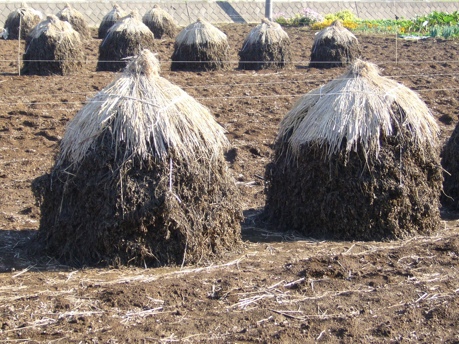 dry-up-peanuts,botti,katori-city,japan